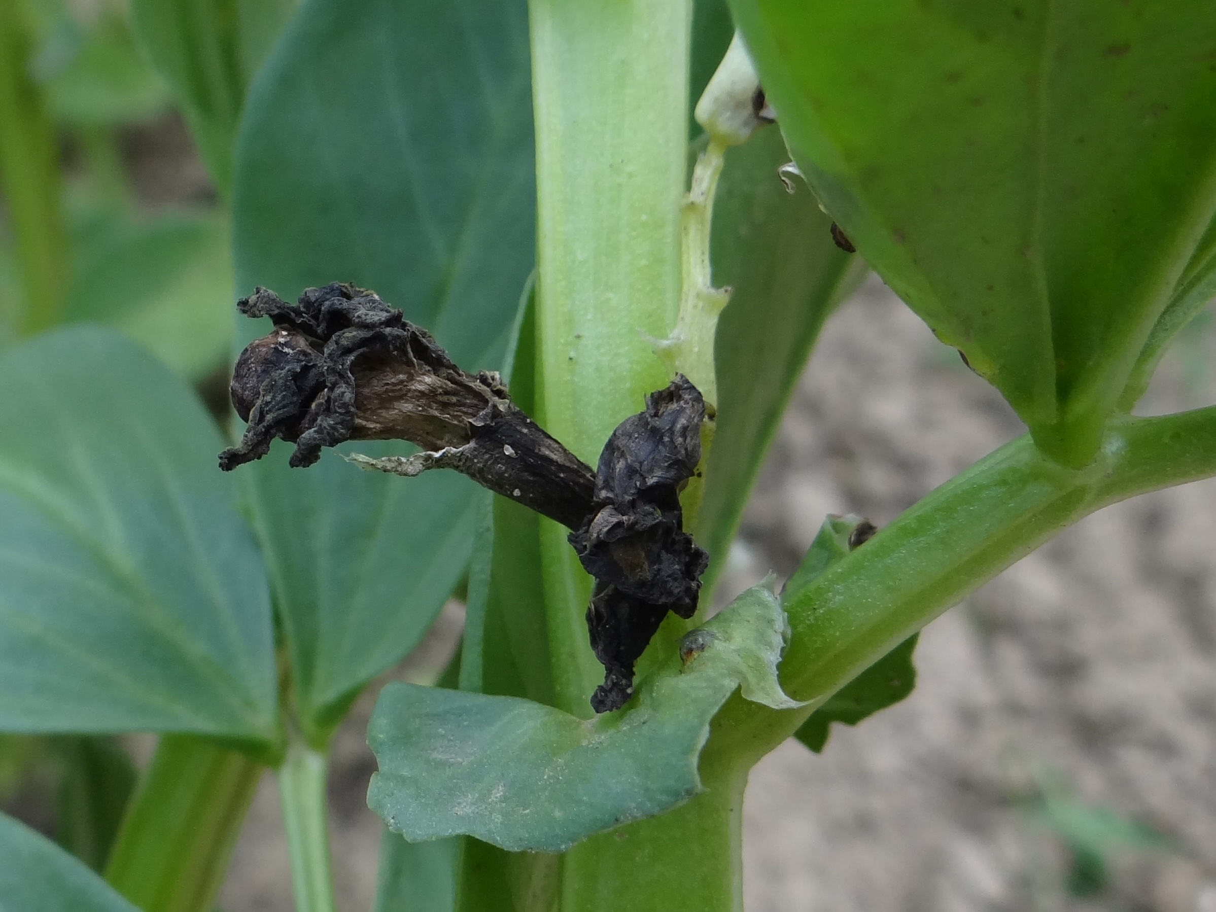 Botrytis fabae on Vicia faba